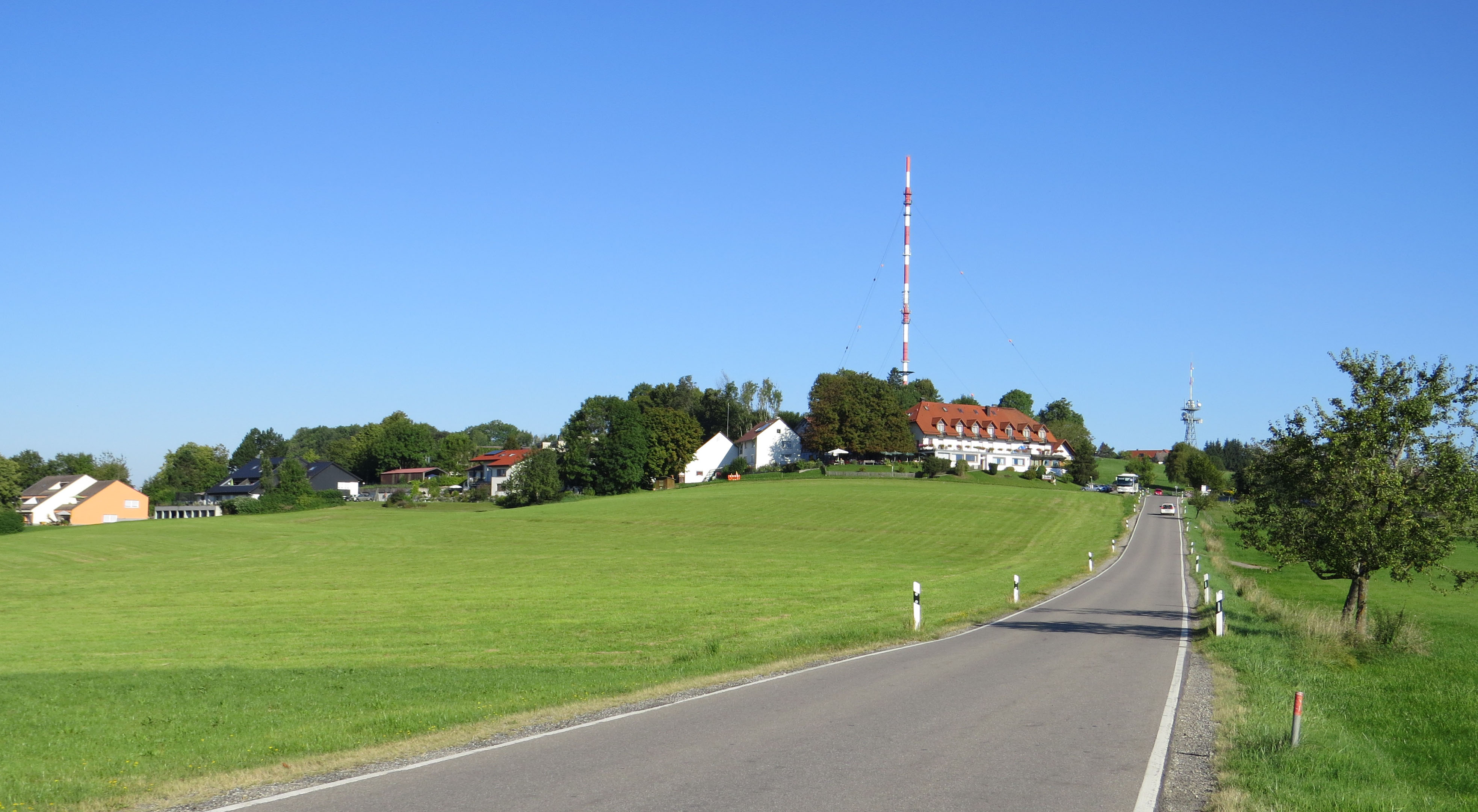 Höchsten von Süden, Deggenhausertal